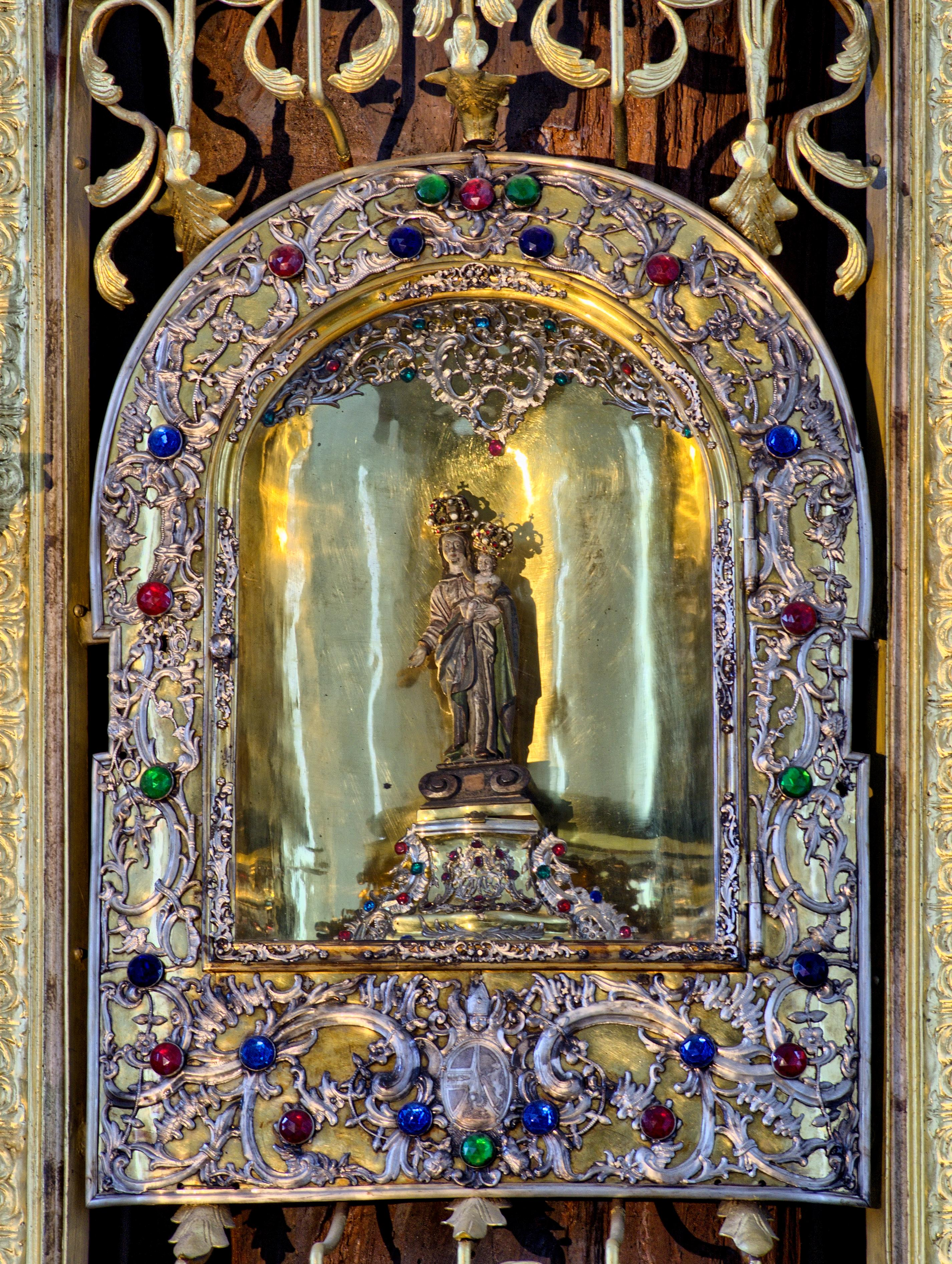 Bilder der Wallfahrtskirche "Maria in der Tanne" in Triberg Schwarzwald